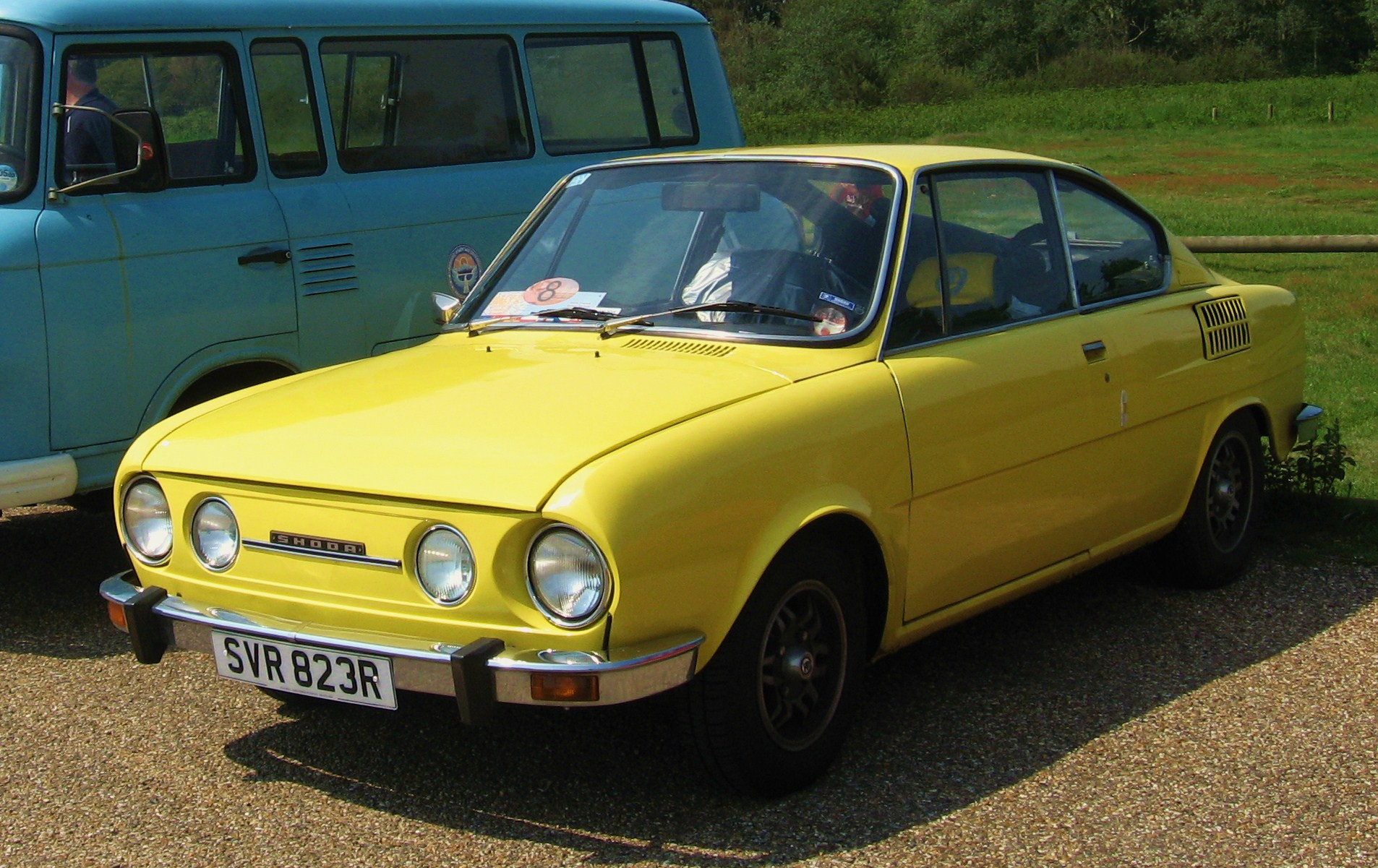 Škoda 110R Coupé